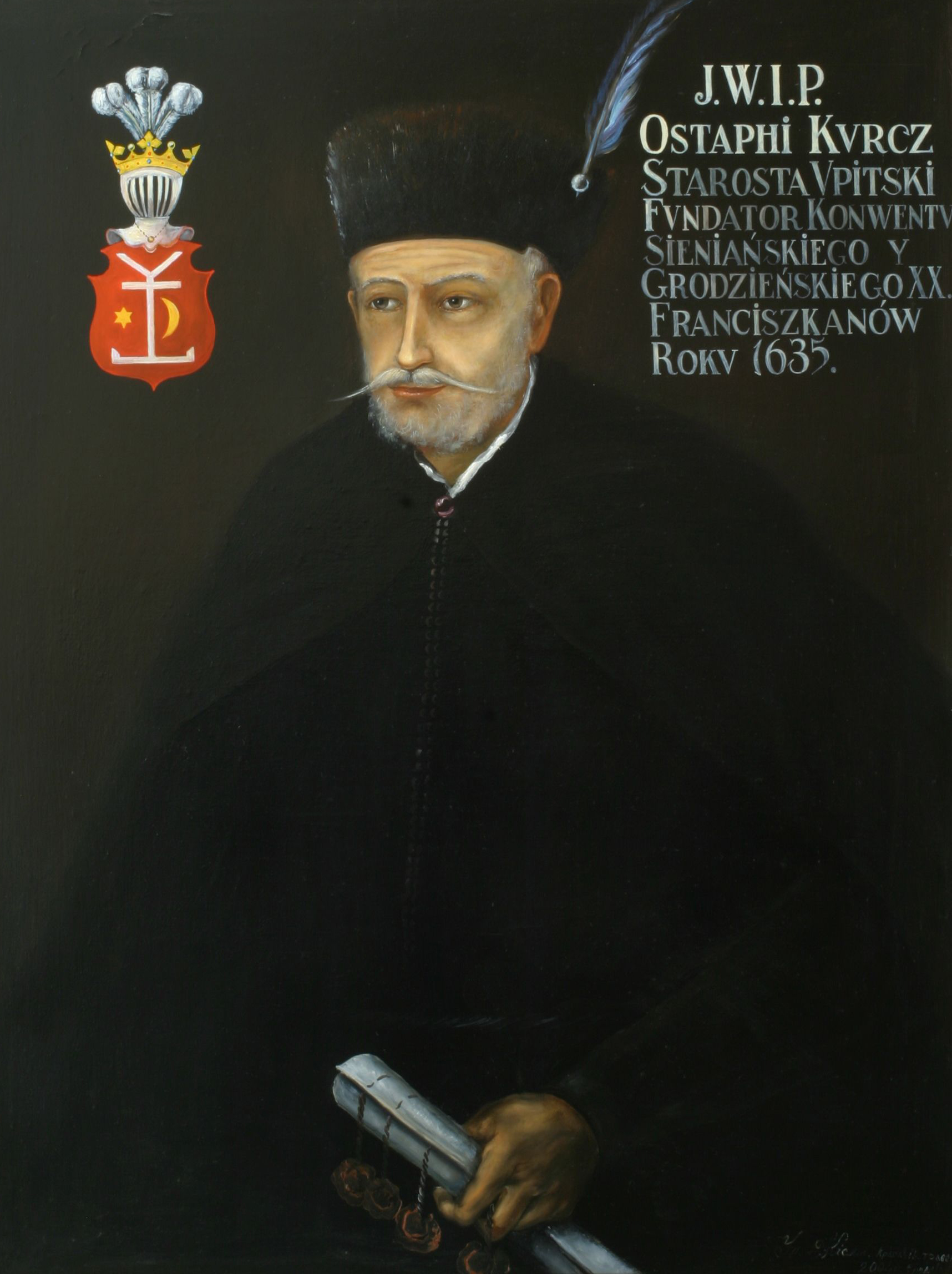 Беларуская (тарашкевіца): Партрэт Яўстаха Курча (Jaŭstach Kurč) гербу «Радван» (?—1647), кашталяна віцебскага